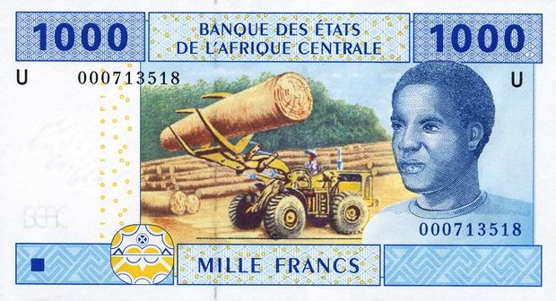 Купюра в 1000 франков КФА. Лицевая сторона